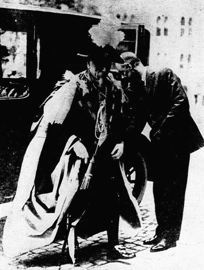 "Basil Zaharoff dans la tenue de grand-croix de l'Ordre du Bain".